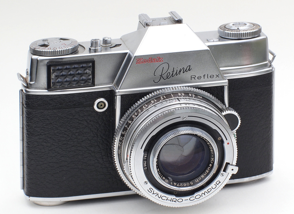 siehe auch hier